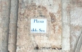 Placa con el nombre de la antigua plaza de la Seo, Valencia